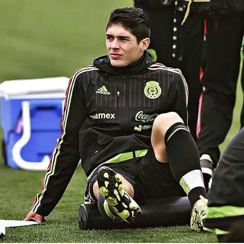 Javier Güeméz, jugador professional